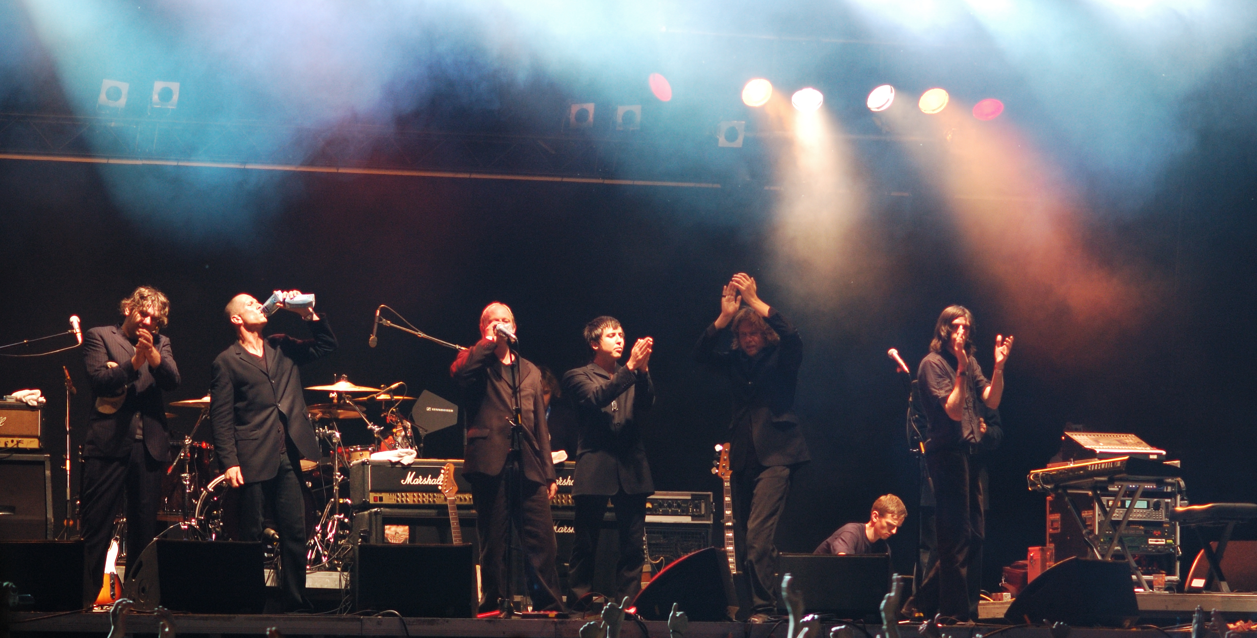 Ende des Auftritts von Archive auf dem Rheinkultur Festival 2006 in Bonn